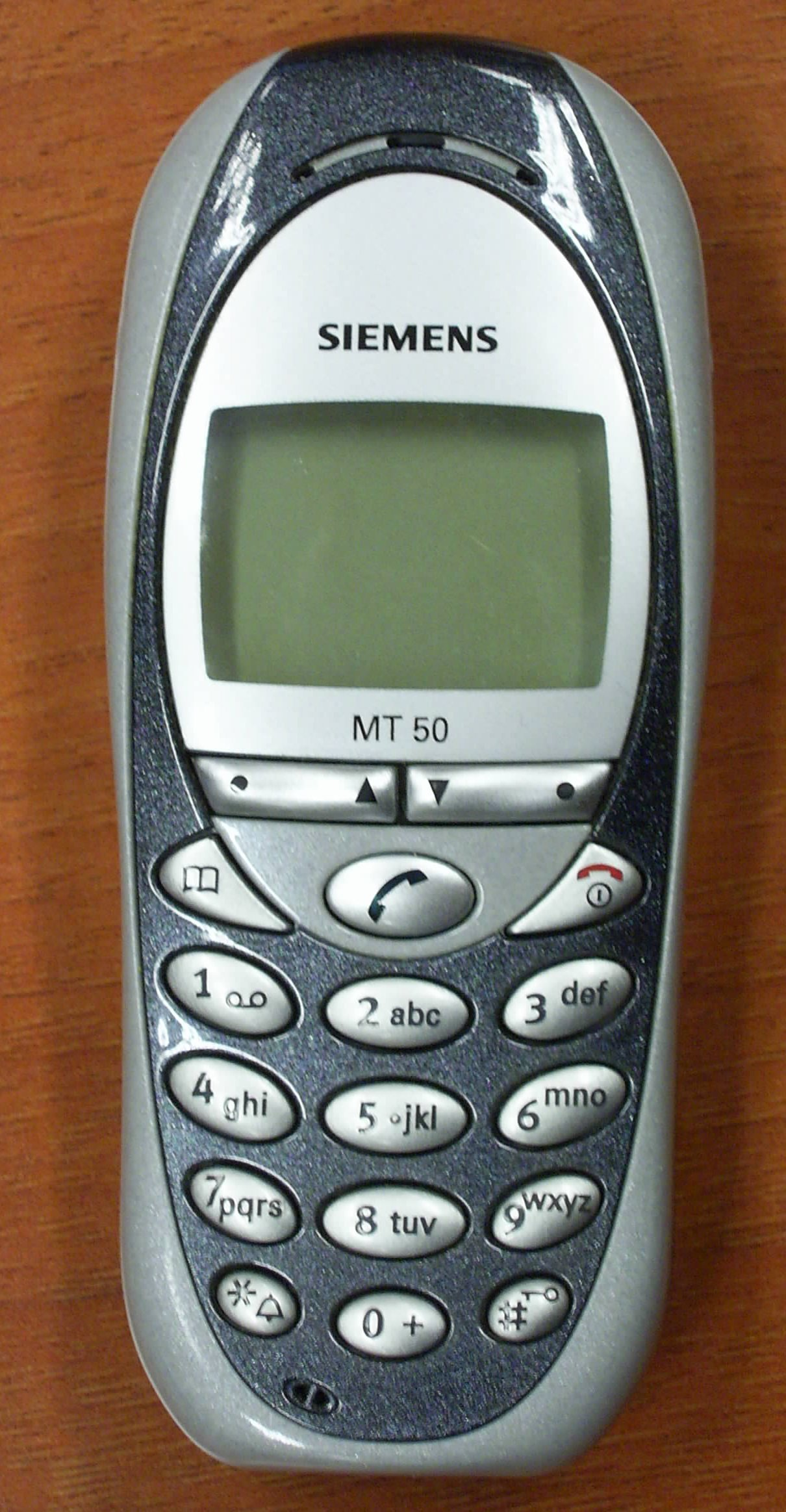 Teléfono móvil Siemens MT 50